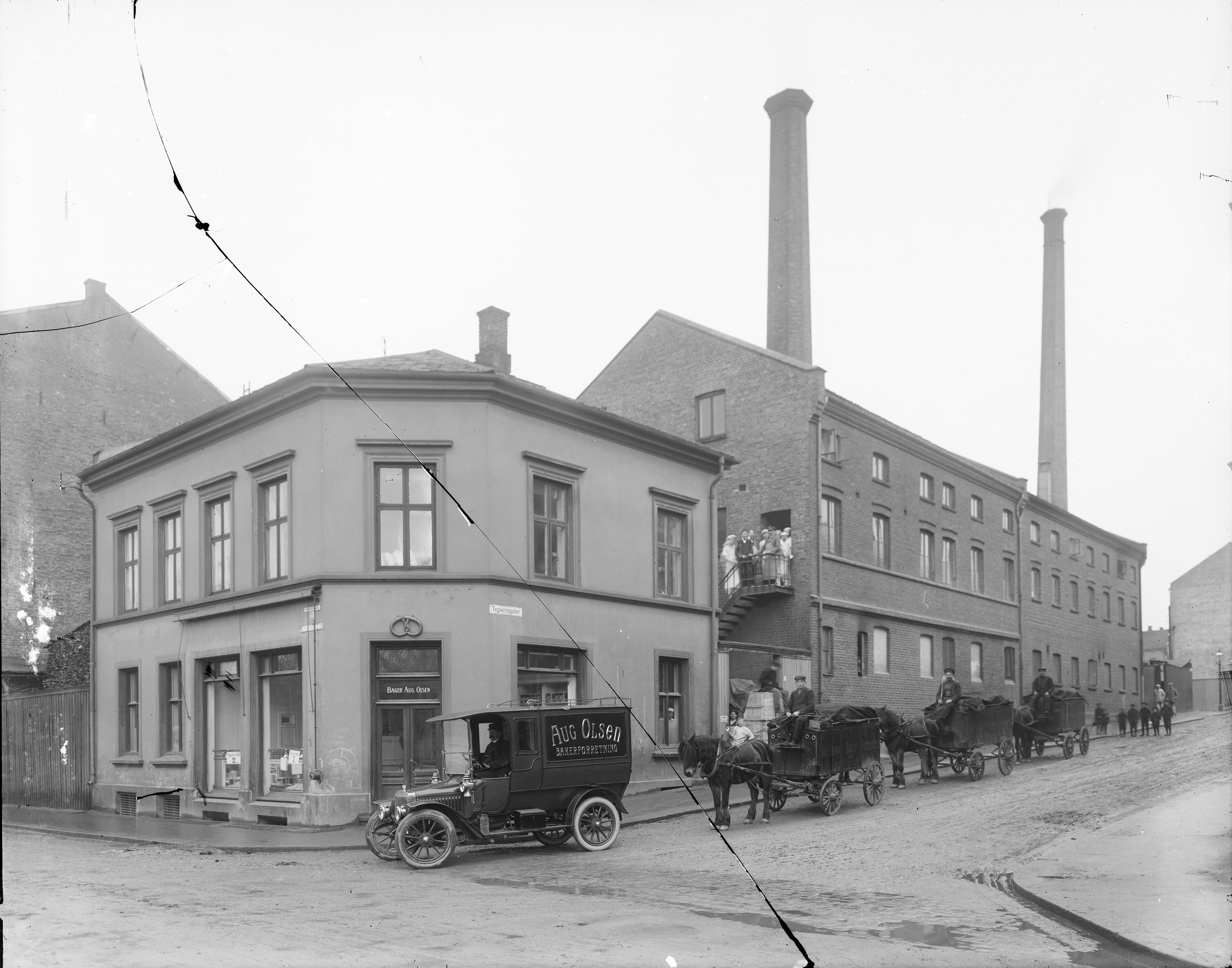 Bildet er hentet fra Nasjonalbibliotekets bildesamling. Anmerkninger til bildet var: Påskrift eske: 6 Grünerløkka, Oslo, Oslo